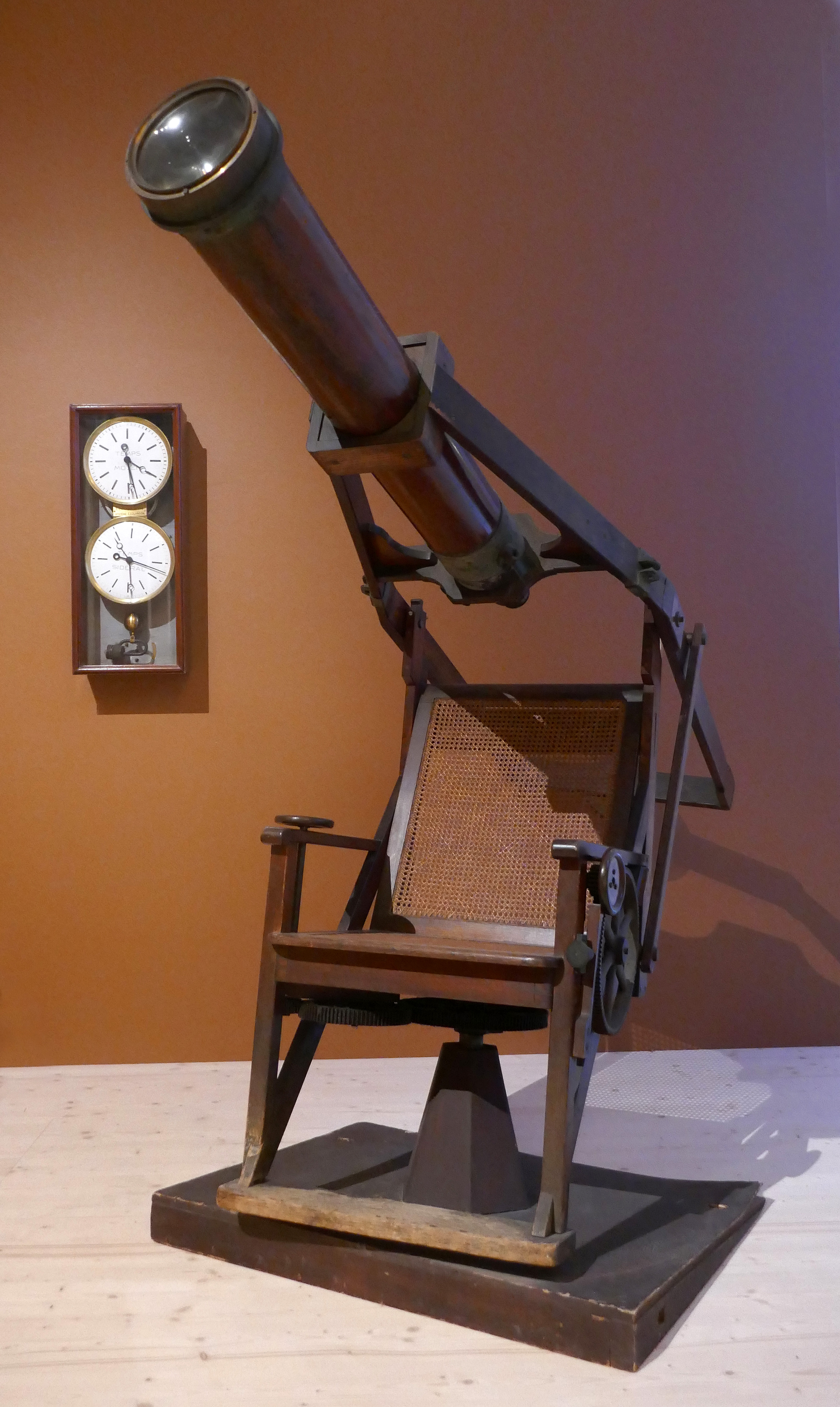 Chercheur de comètes Repsold. 4e quart du 19e s. Laiton, acajou, chêne, verre, fonte de fer. D'abord utilisé à l'Observatoire de la Krutenau, le chercheur a été ensuite installé sur la terrasse de la coupole de la grande lunette du nouvel observatoire. Il a permis la découverte de plusieurs comètes, dont la comète Winnecke-Pons. Collection de l'Observatoire astronomique de Strasbourg. Exposition Laboratoire d'Europe Strasbourg, 1880-1930 au Musée d'art moderne et contemporain de Strasbourg.